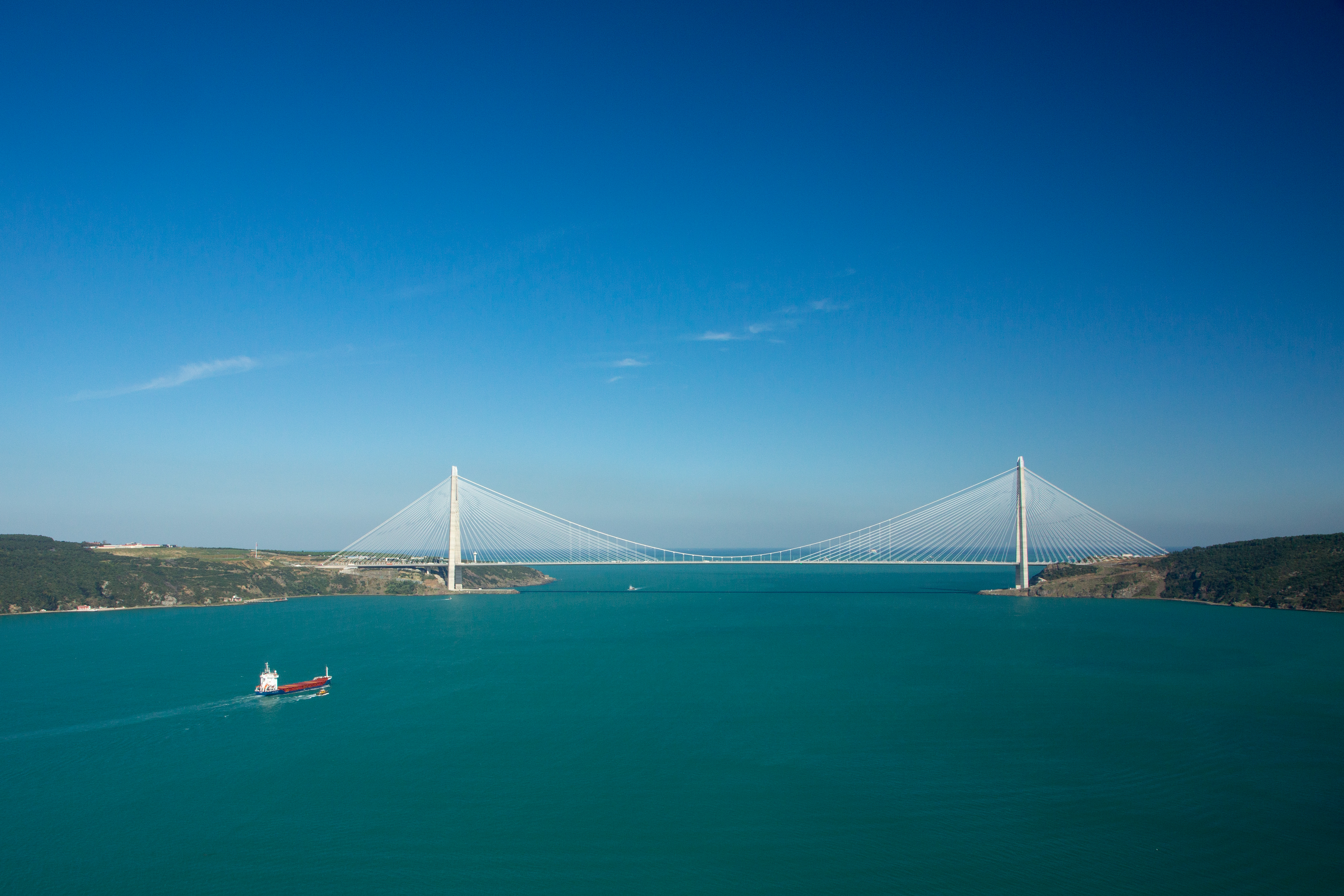 Yavuz Sultan Selim Bridge